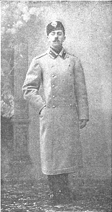 Retrato de Jaime de Borbón y Borbón-Parma, publicado en la revista española Nuevo Mundo.